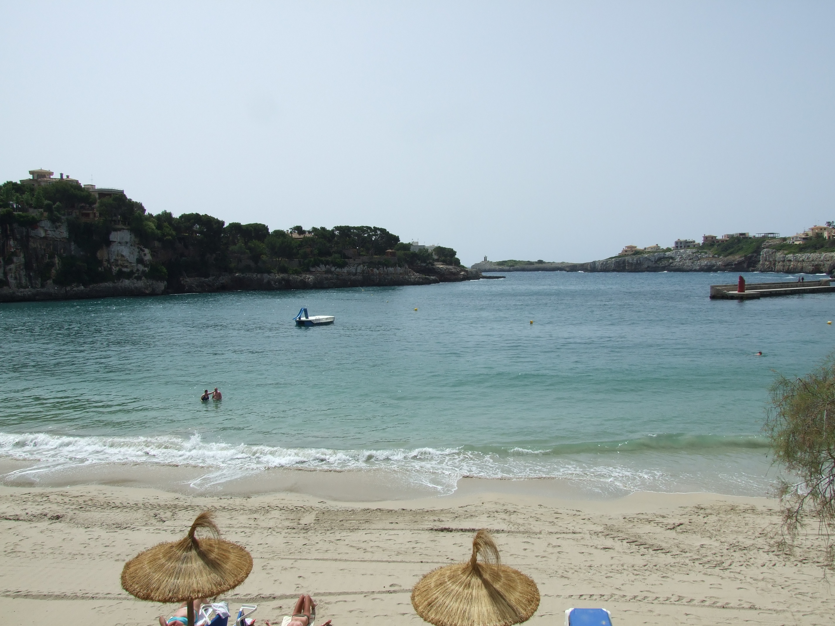 Blick auf die Hafeneinfahrt Portocristo / Mallorca